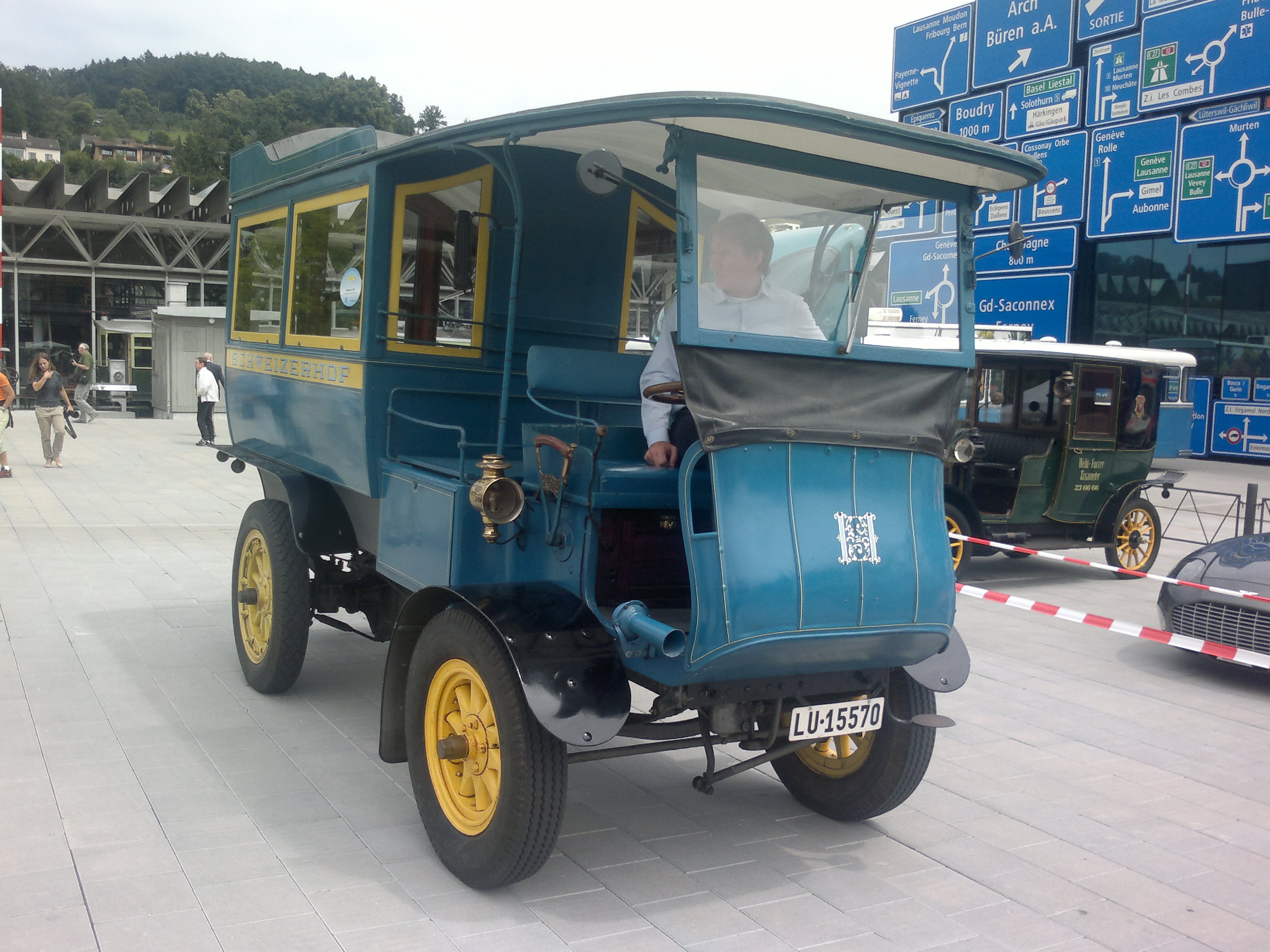 Tribelhorn Personentransporter des Hotel Schweizerhof Luzern